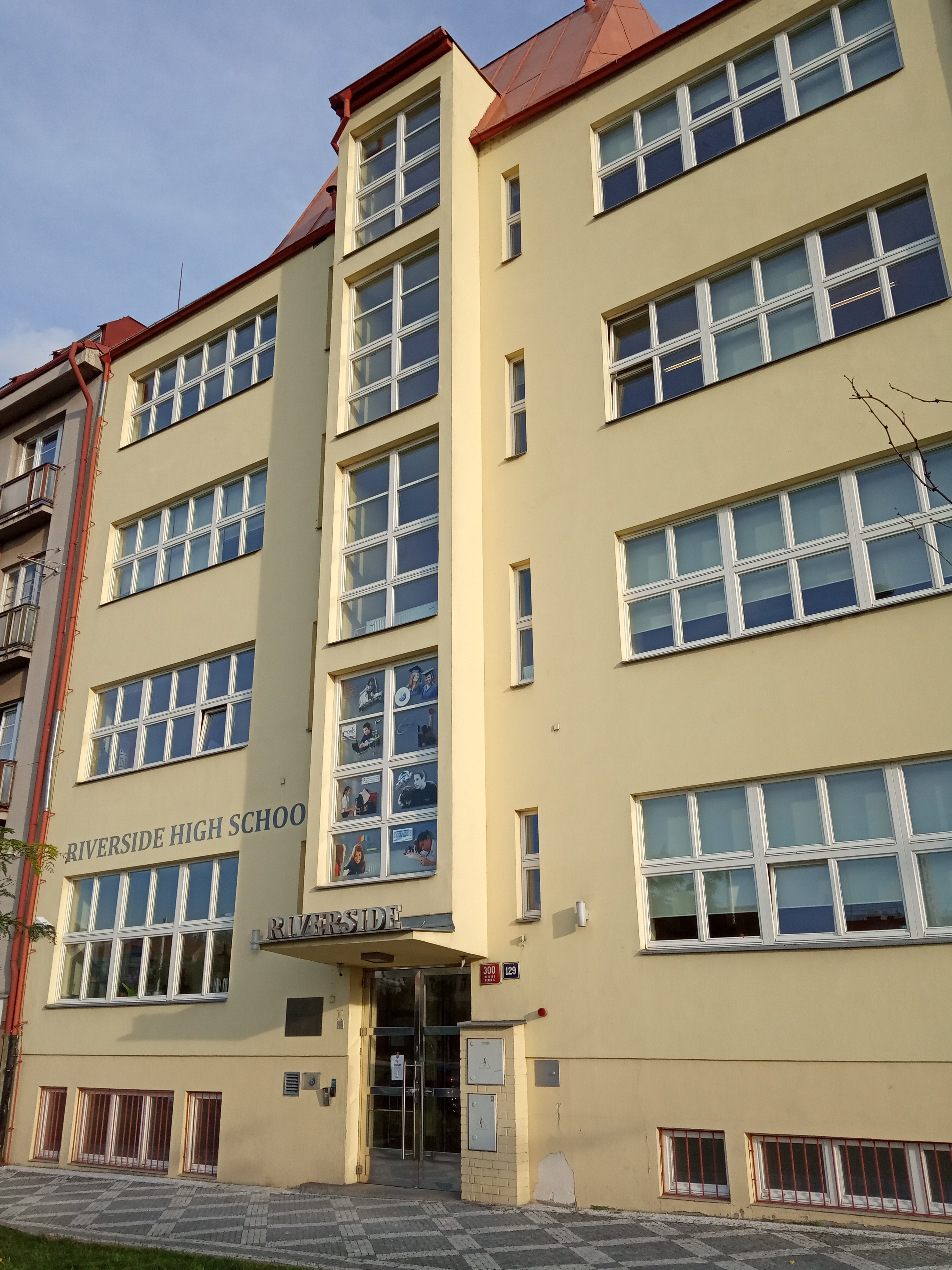 Praha - Hradčany, Milady Horákové 129, Riverside High School